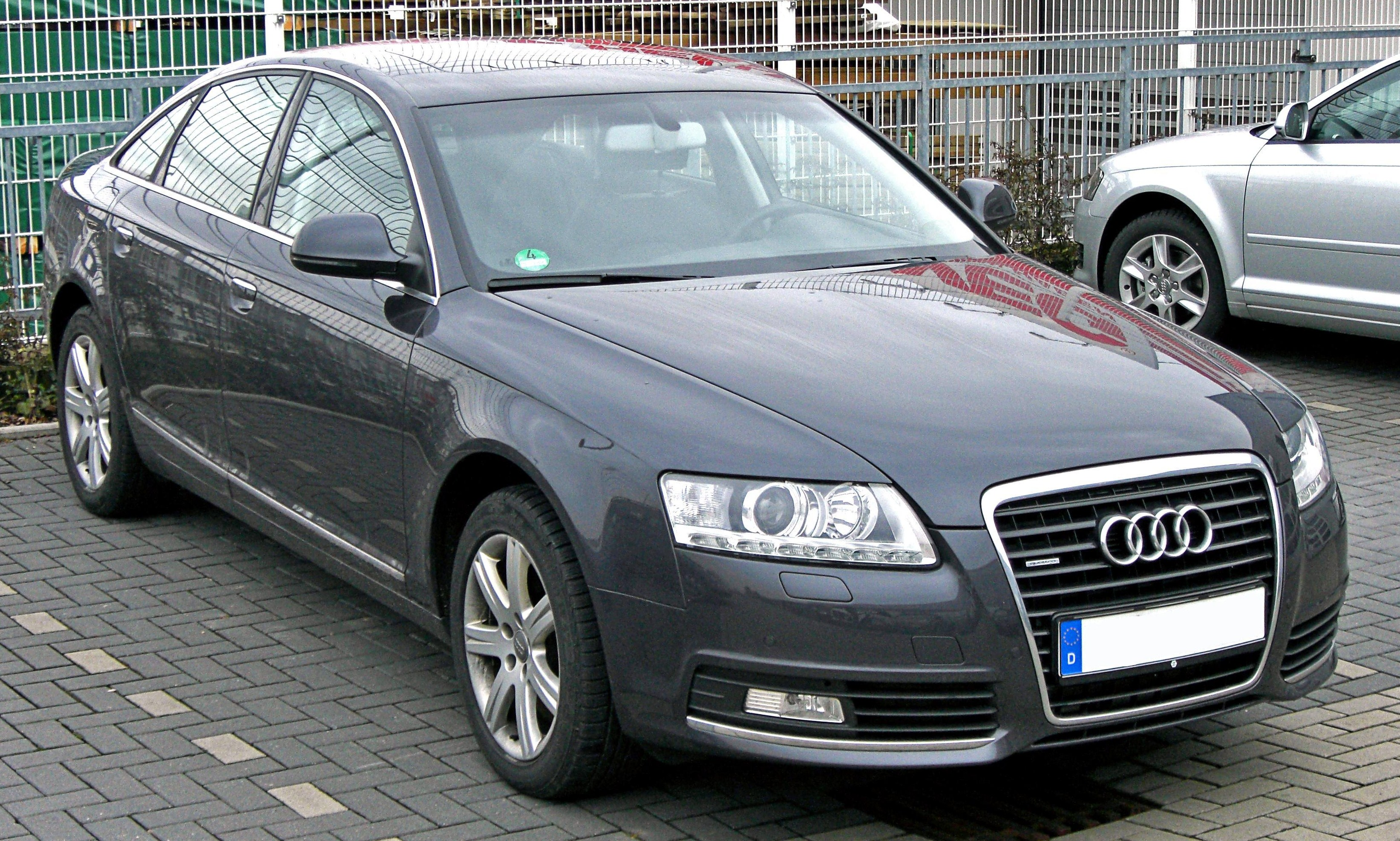 Audi A6